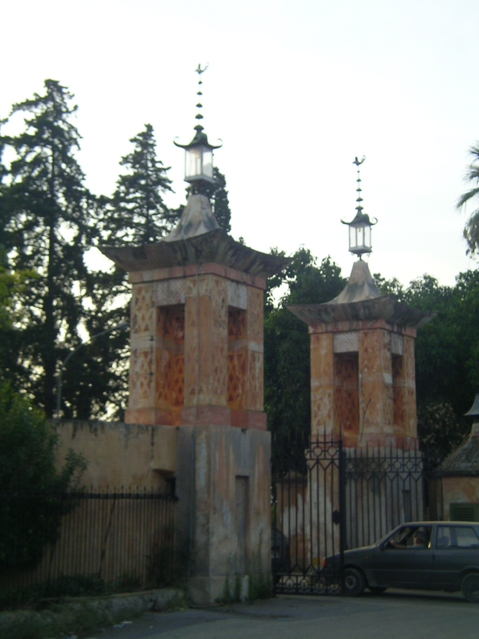 Tor zum Parco della Favorita; Palazzina cinese gate